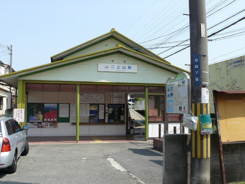 近鉄二上山駅改札口